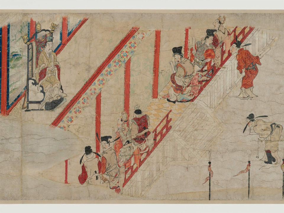 Rouleau 1, palais impérial chinois (annonce de l'arrivée du ministre japonais Kibi no Makibi)